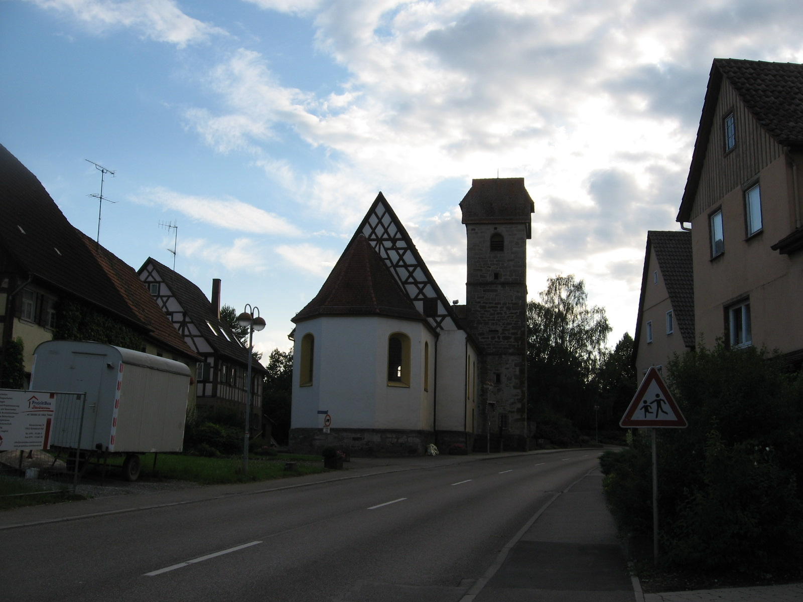 Bühlertann, Blick nach SW auf die Gangolf-Kapelle